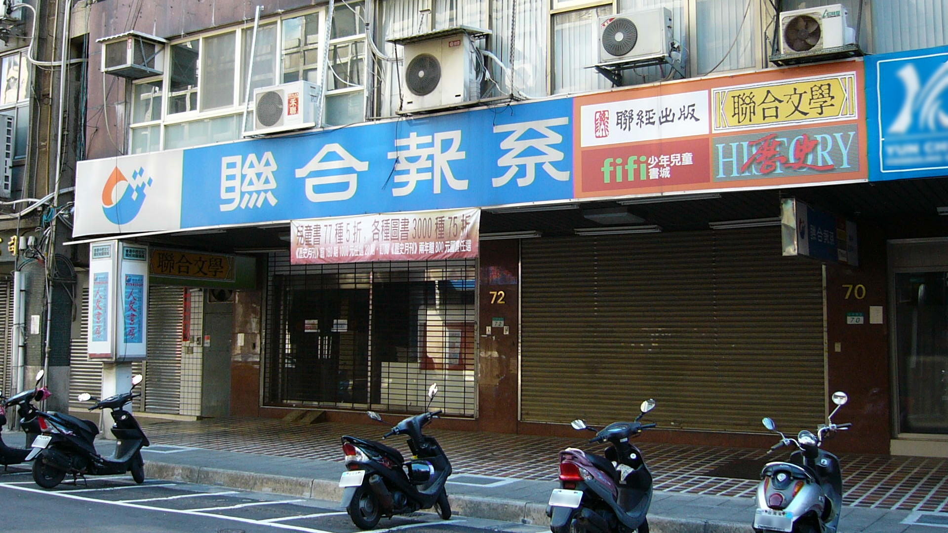 聯合報系城中服務中心，位於臺北市中正區延平南路72號1樓。